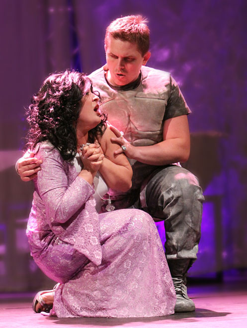 Ilja Siltšukov ja Veronika Džiojeva ooperi Thaïs lavastusest festivali PromFest raames Muusikaline juht ja dirigent - Erki Pehk Lavastaja - Mai Murdmaa Kunstnik - Madis Nurms Valguskunstnik - Margus Vaigur